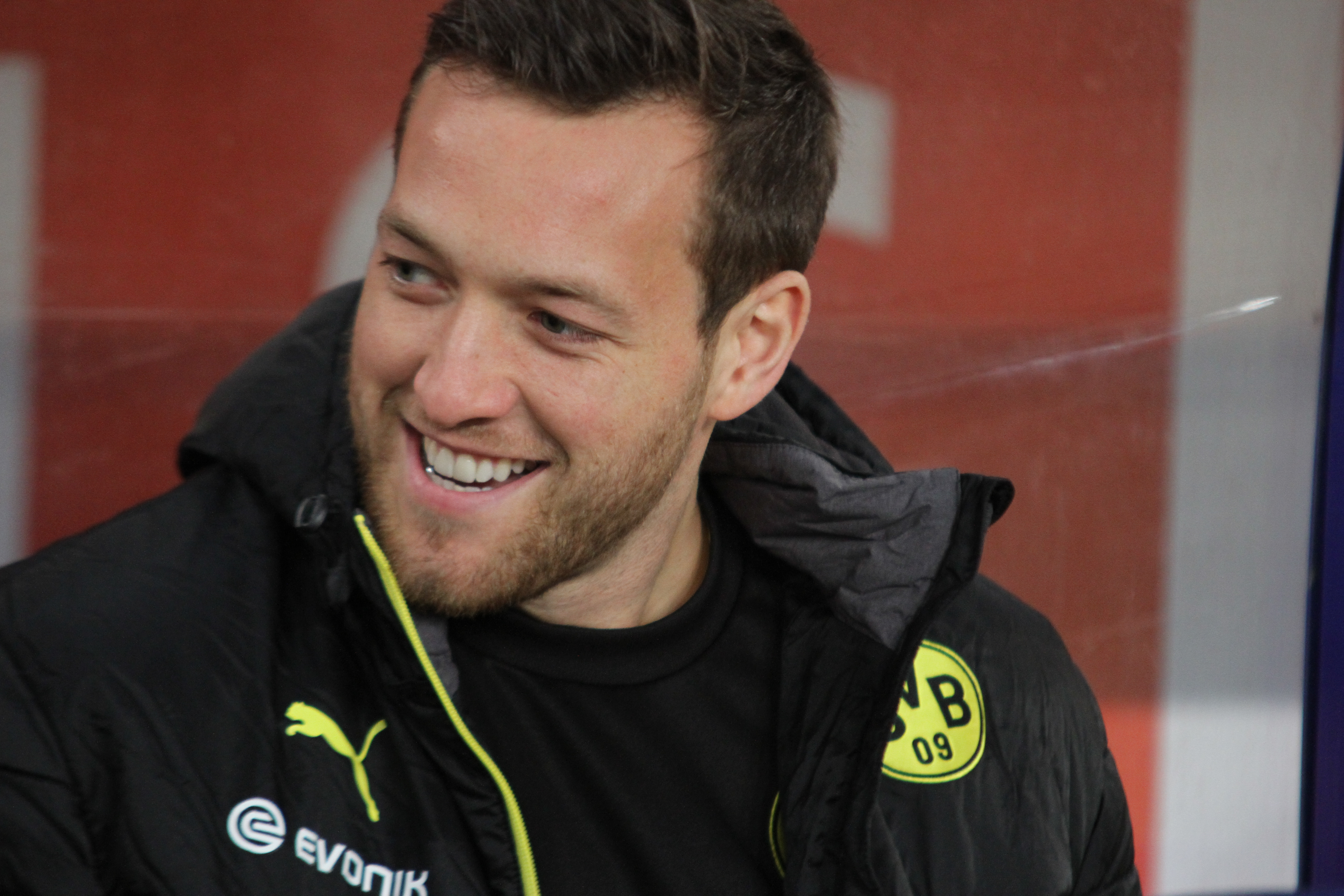 Julian Schieber (Borussia Dortmund)